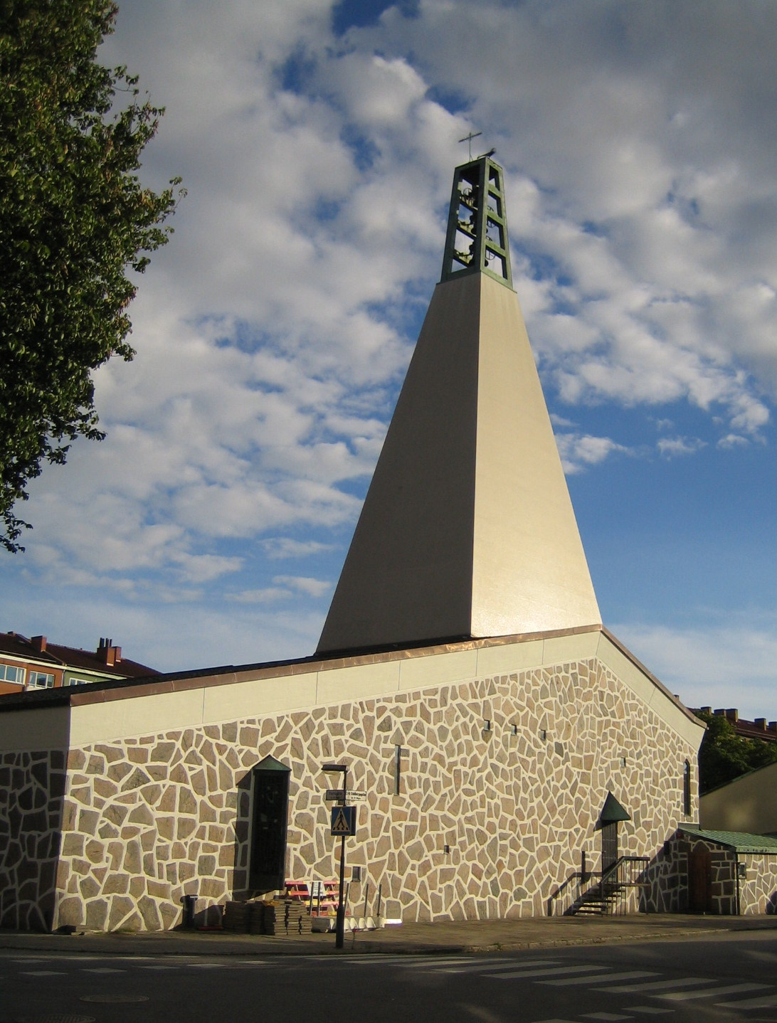 Vår Frälsares kyrka, catolic church in Malmö.